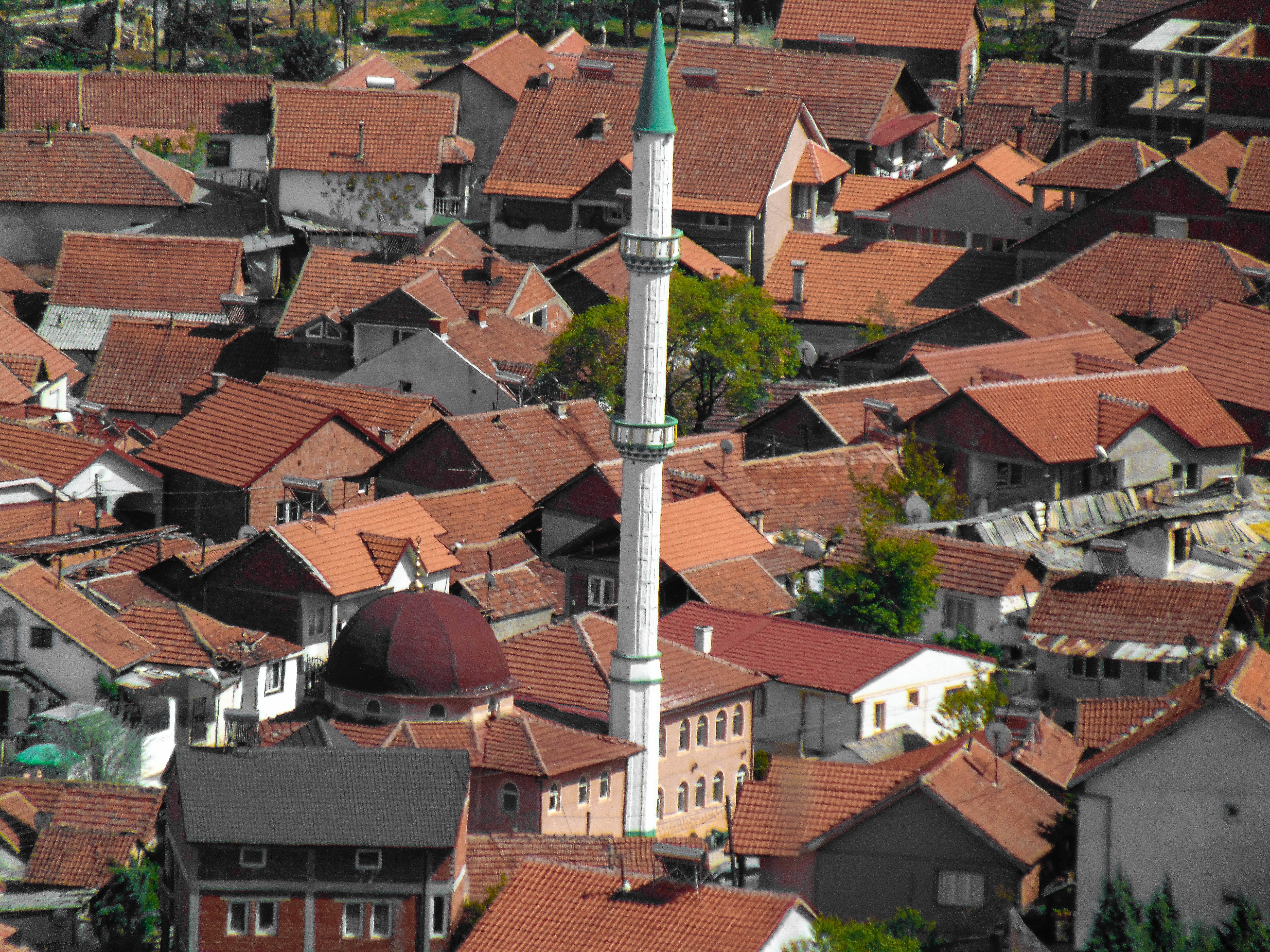 Џамија Сејид Нур Ел Араби - Струмица